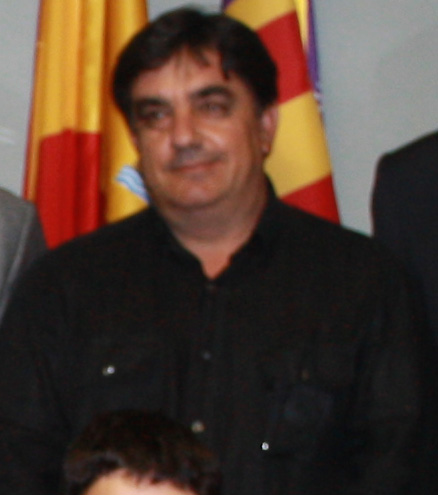 Joan Juan Pons, Batle de Campos entre el 18 de gener de 2010 i l'11 de juliol de 2011 amb CxC